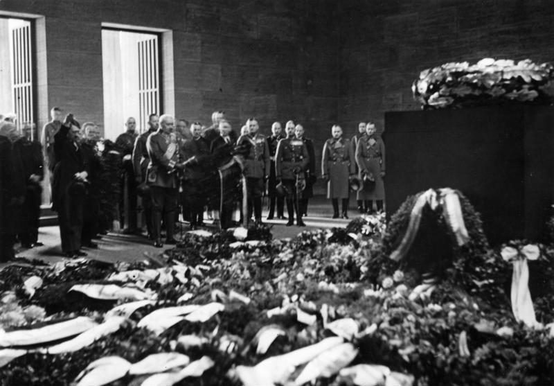 Berlin, Kranzniederlegung im Ehrenmal Scherl Bilderdienst Hindenburg und Hitler zum Volkstrauertag 1933 im Berliner Reichsehrenmal [Unter den Linden] Abgebildete Personen: Hindenburg, Paul von Beneckendorff und von: Reichspräsident, Generalfeldmarschall, Deutschland (GND 118551264) Hitler, Adolf: Reichskanzler, Deutschland